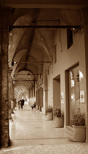 Bologna, Italia